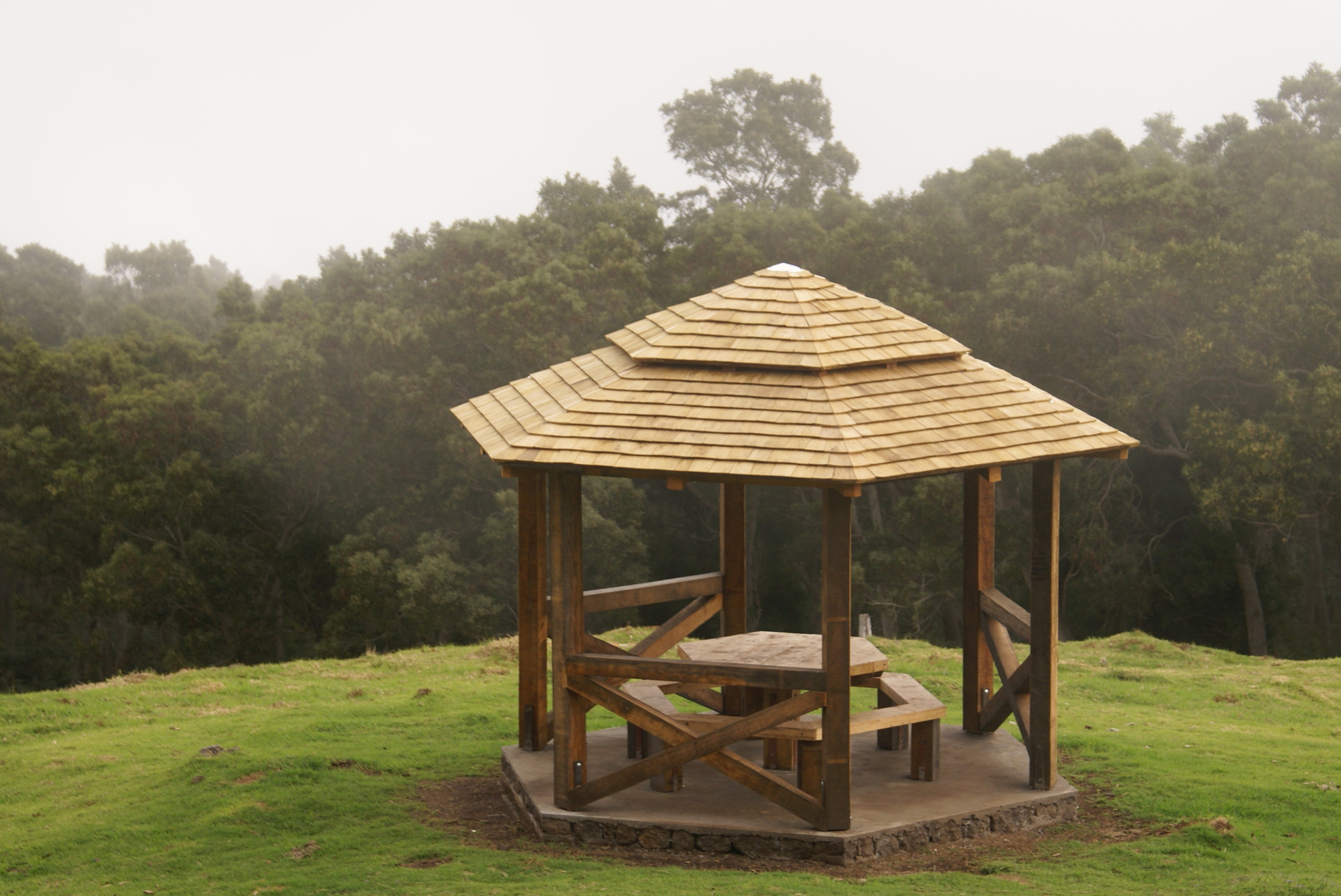 Kiosque à pique-nique sur la route du Maïdo à La Réunion